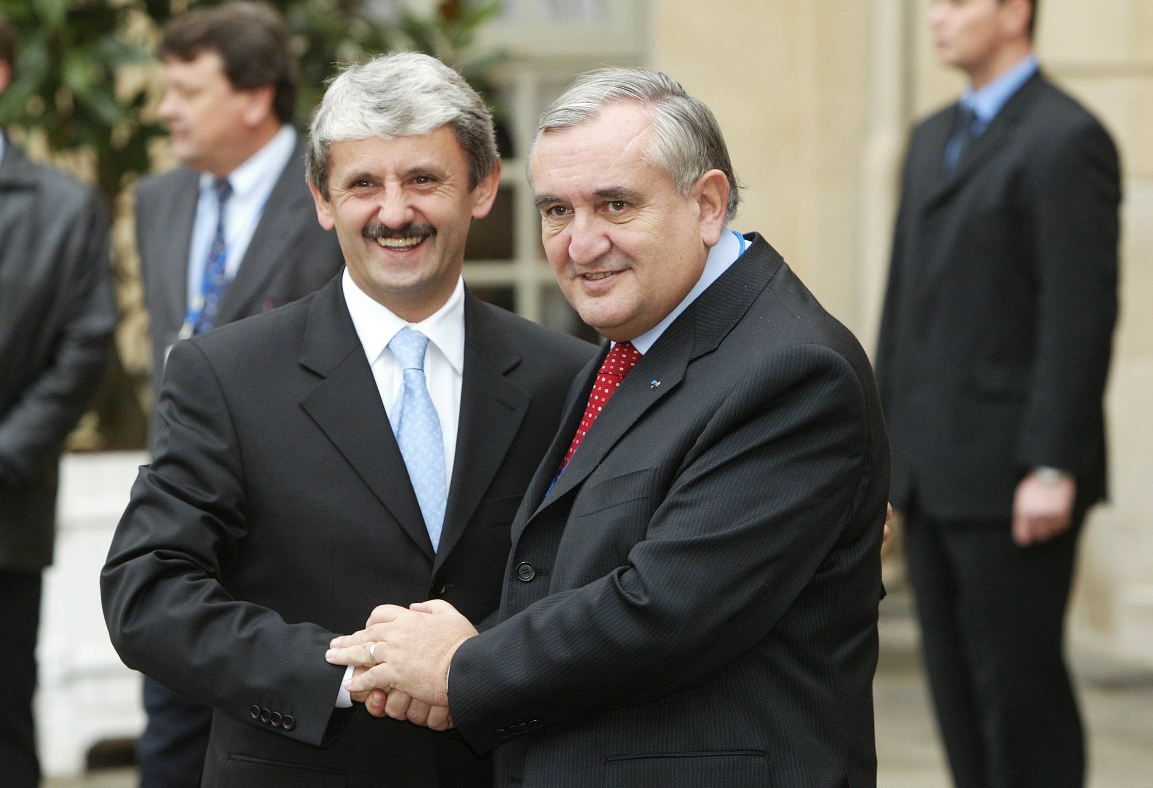 EPP Summit 4 December 2003 Paris